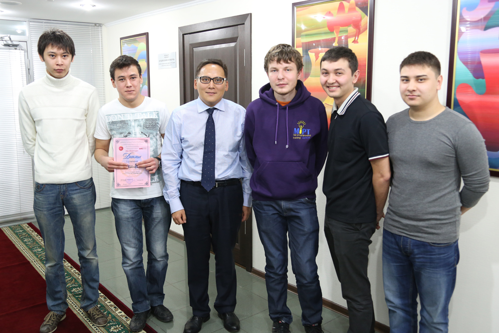 Фото сотрудники МУИТ со студентами участвовавших в ACM ICPC